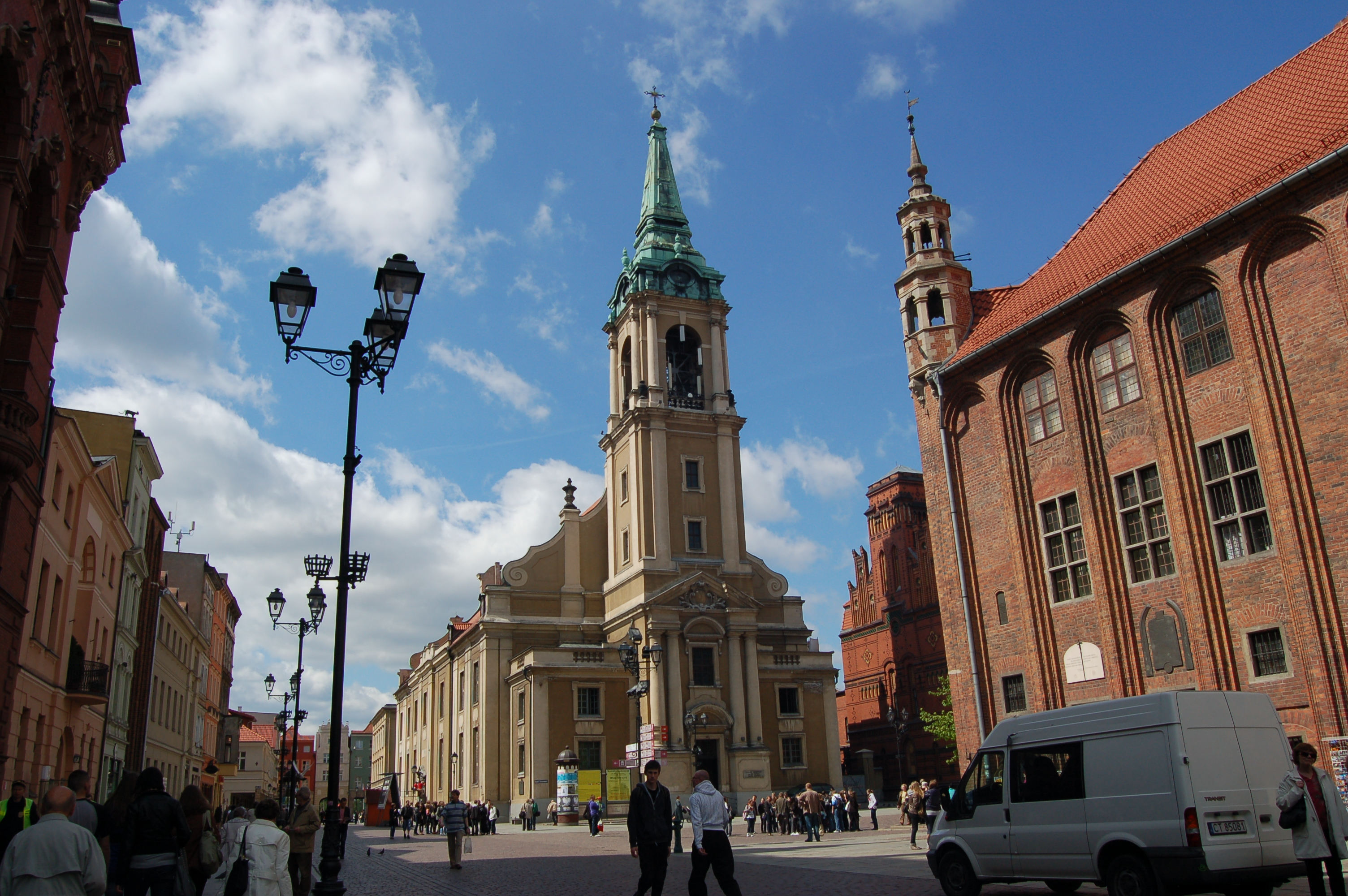 Torun, Polen